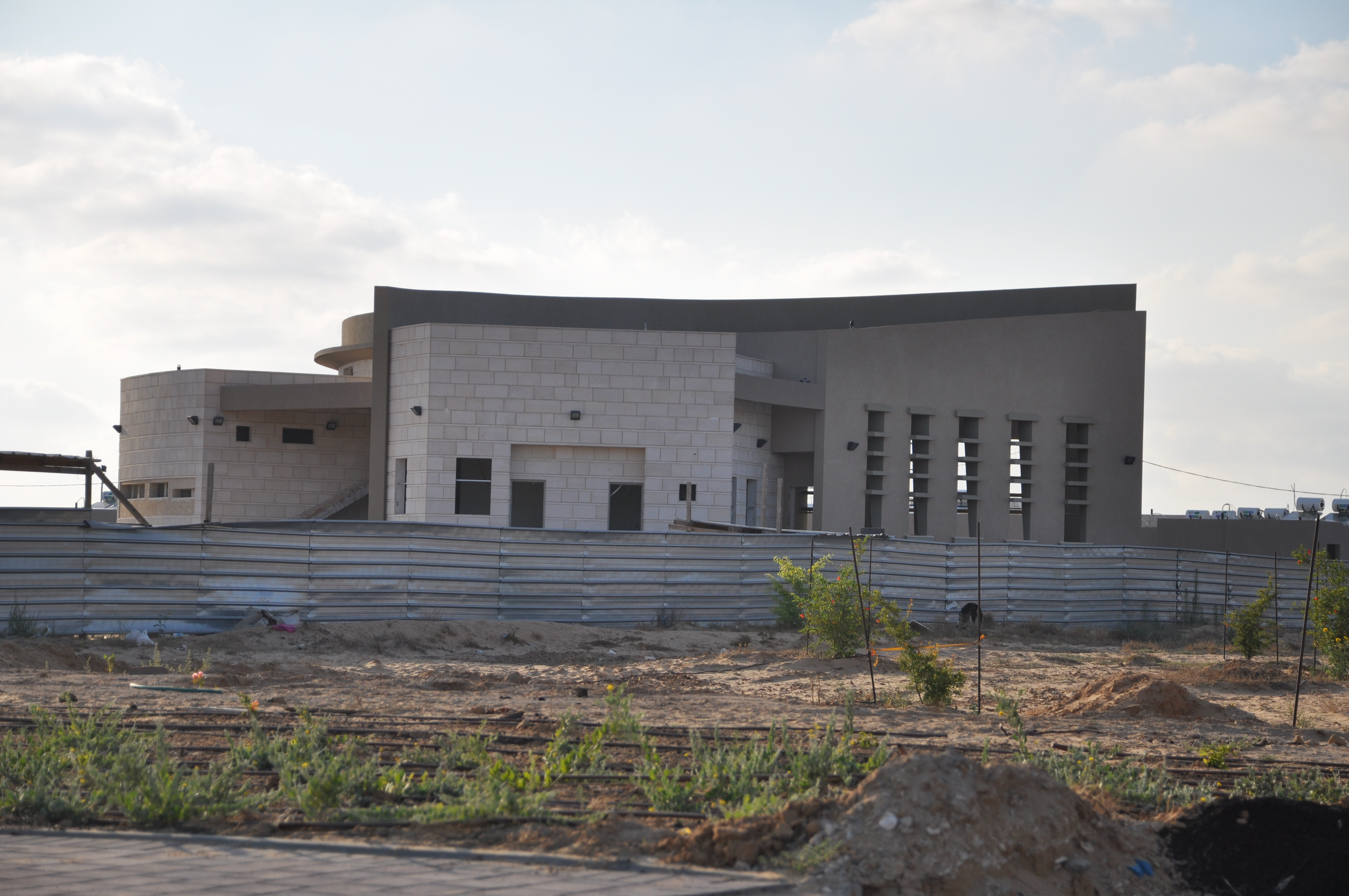 בית המדרש של המכינה, כעת בבניה